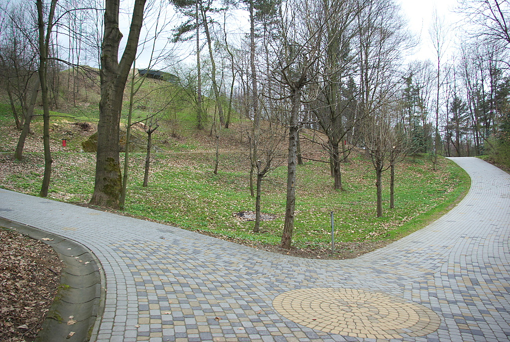 Park im. Mickiewicza Sanok